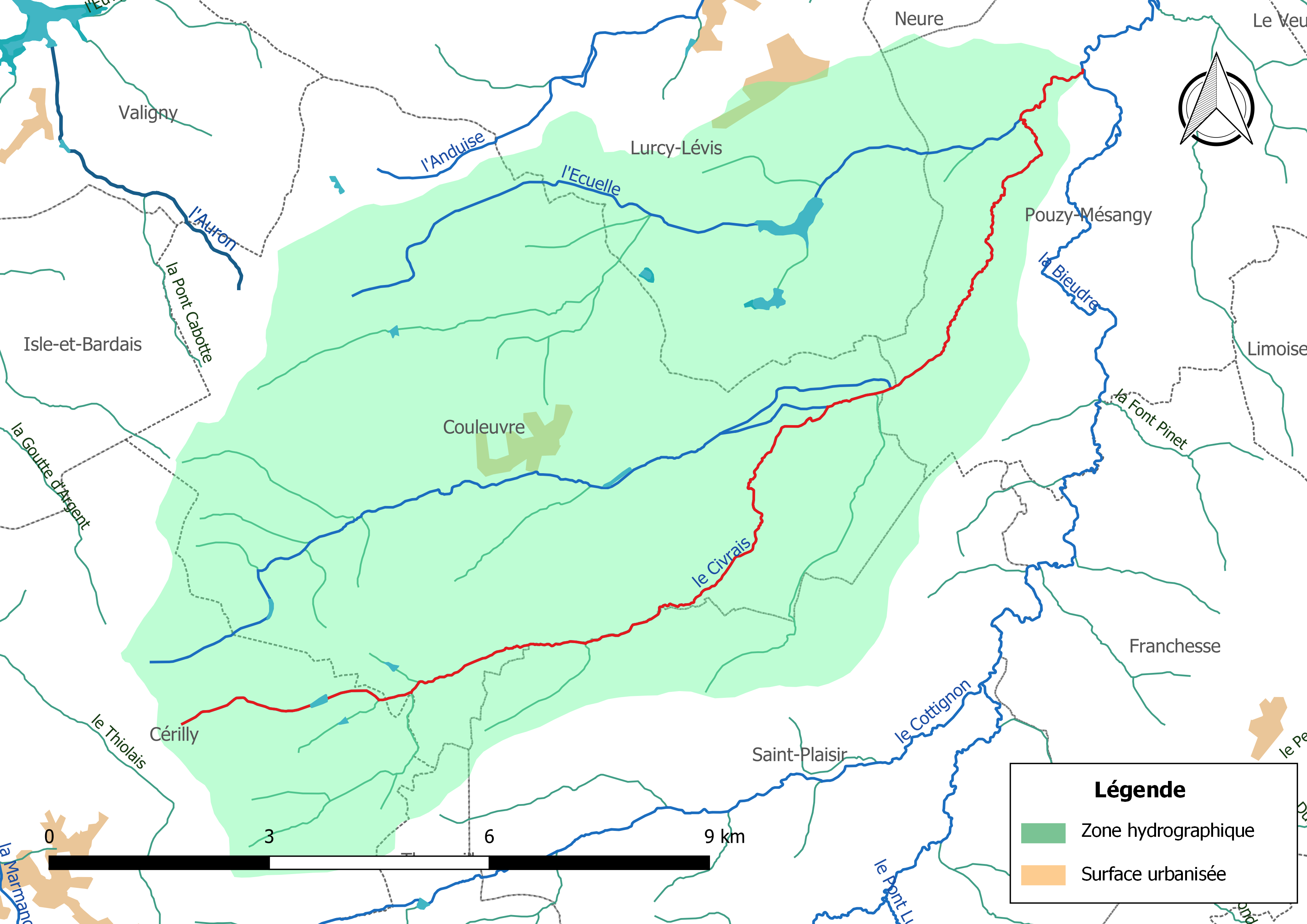 Carte du cours d'eau « le Civrais » (France) et de la zone hydrographique dans laquelle il s'insère.